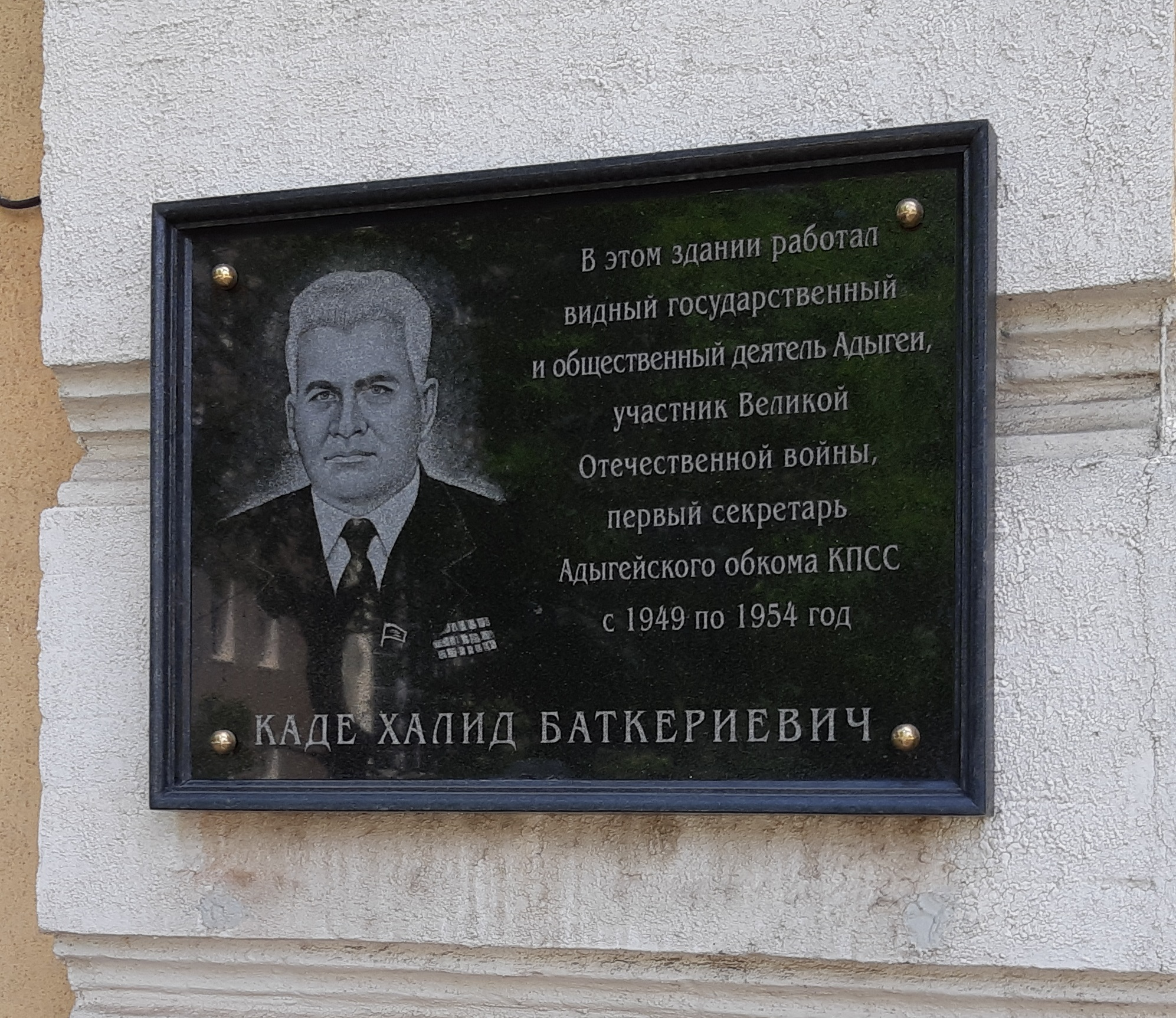 Каде Халид Баткериевич